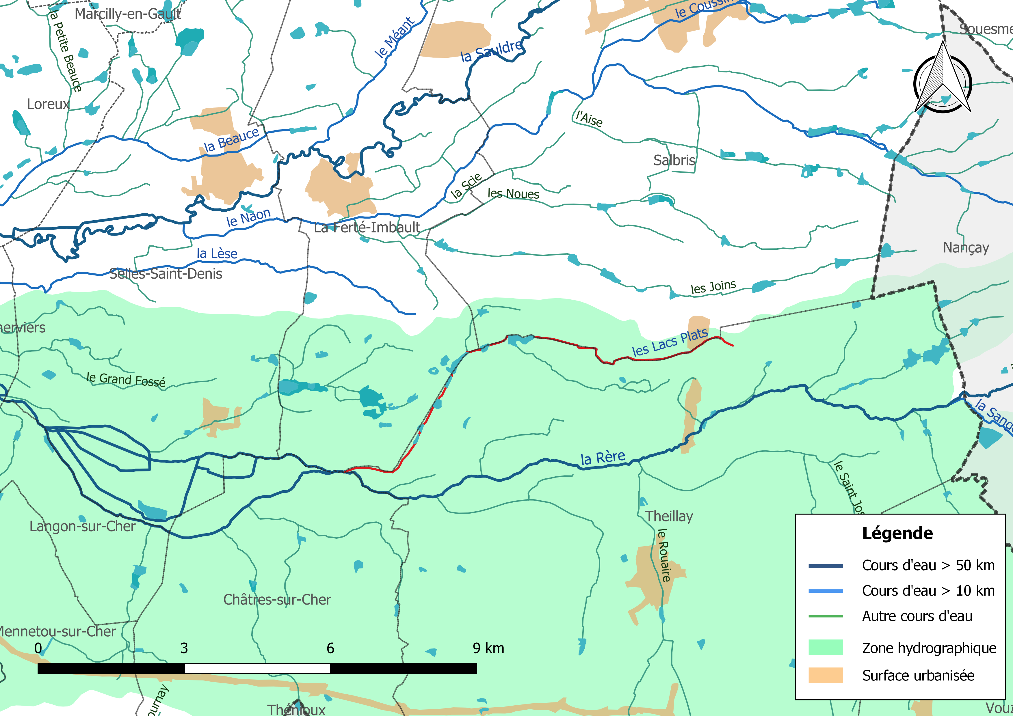 Carte du cours d'eau « Les Lacs Plats » et de son bassin versant (zone hydrographique dans laquelle il s'insère).